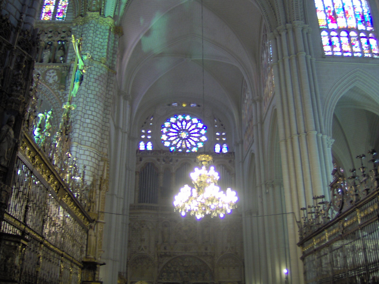 Interior de la Catedral de Toledo (España)